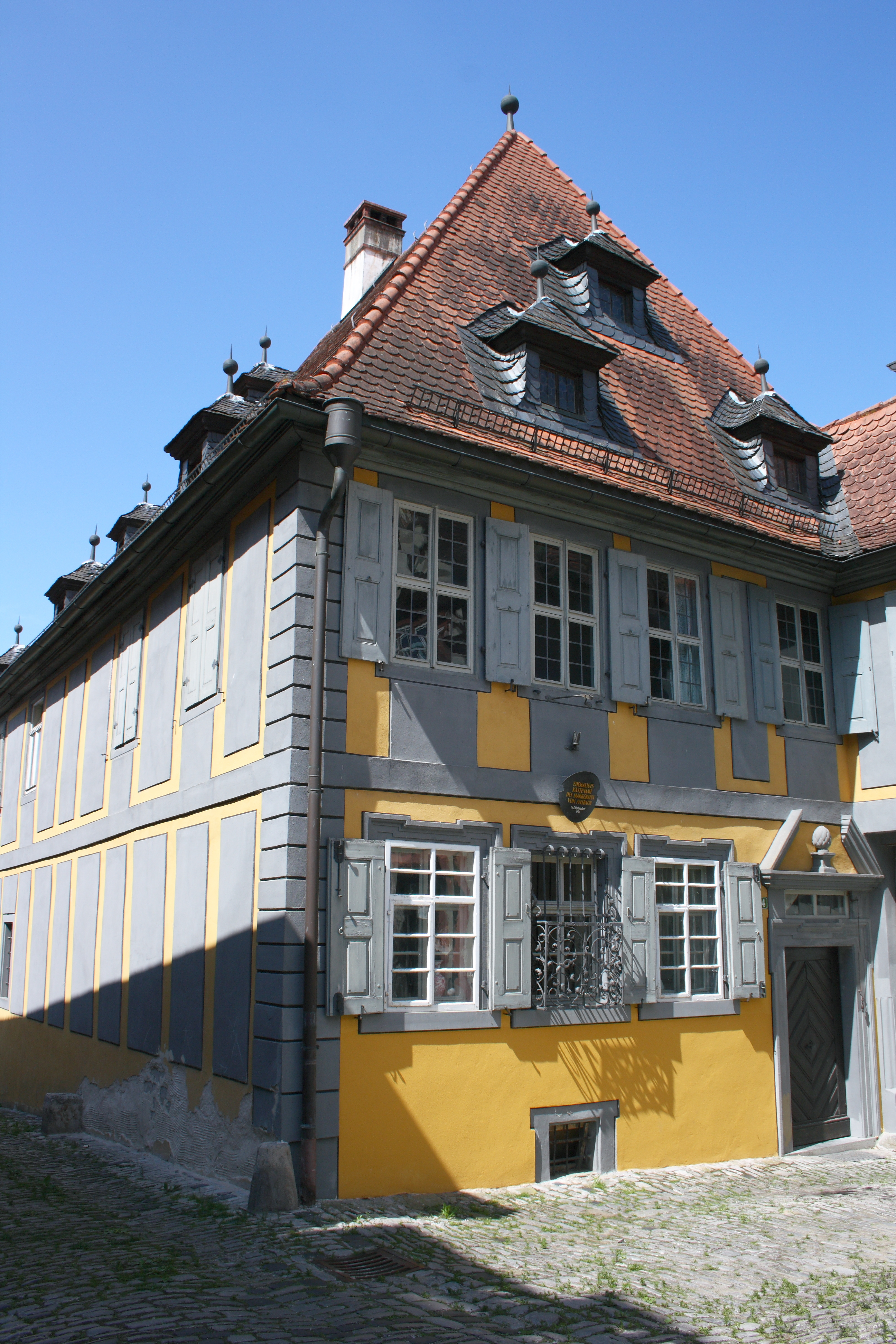 Haus Scheuerleinplatz 4 in Mainbernheim im Landkreis Kitzingen (Bayern)